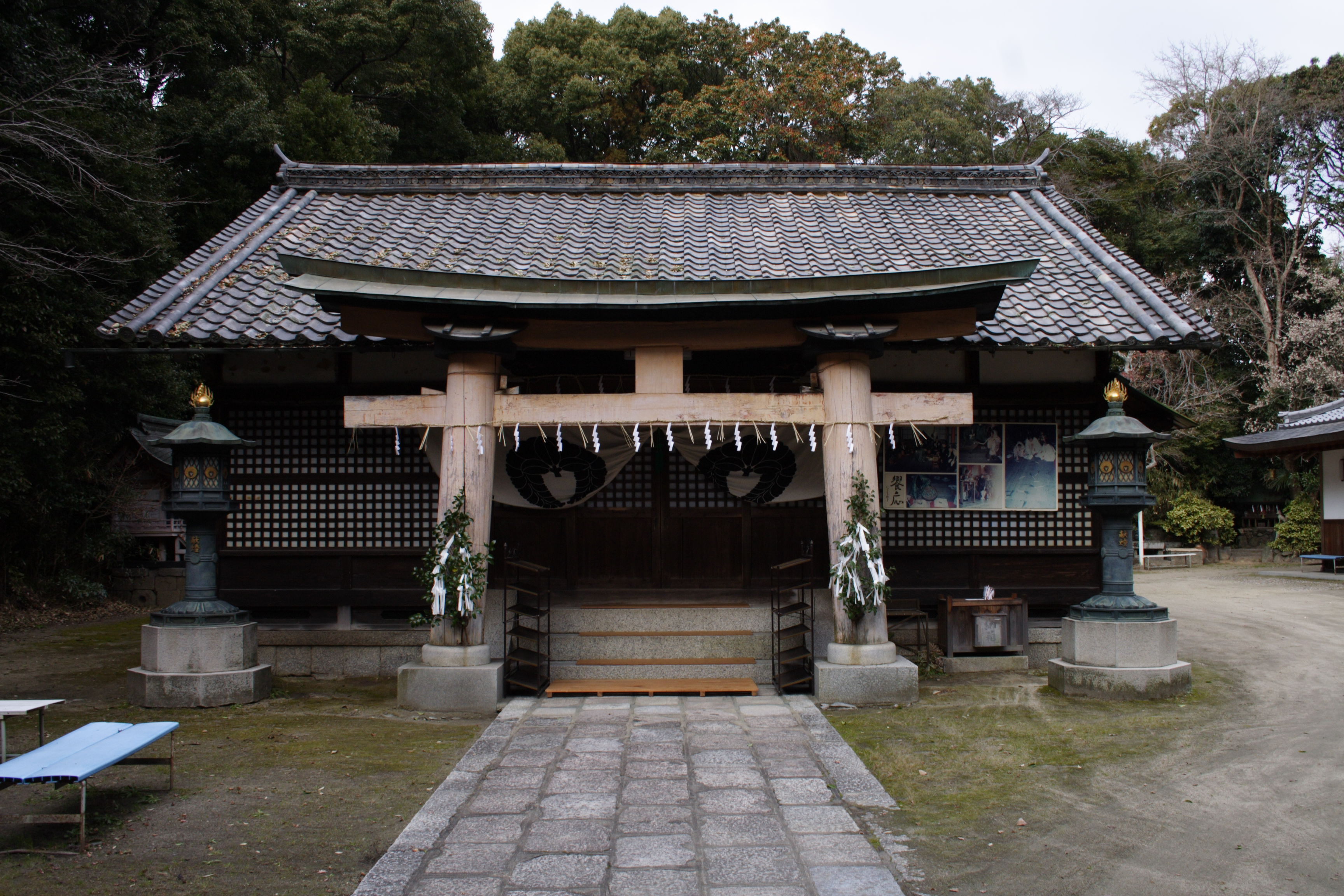 涌出宮(京都府相楽郡山城町)